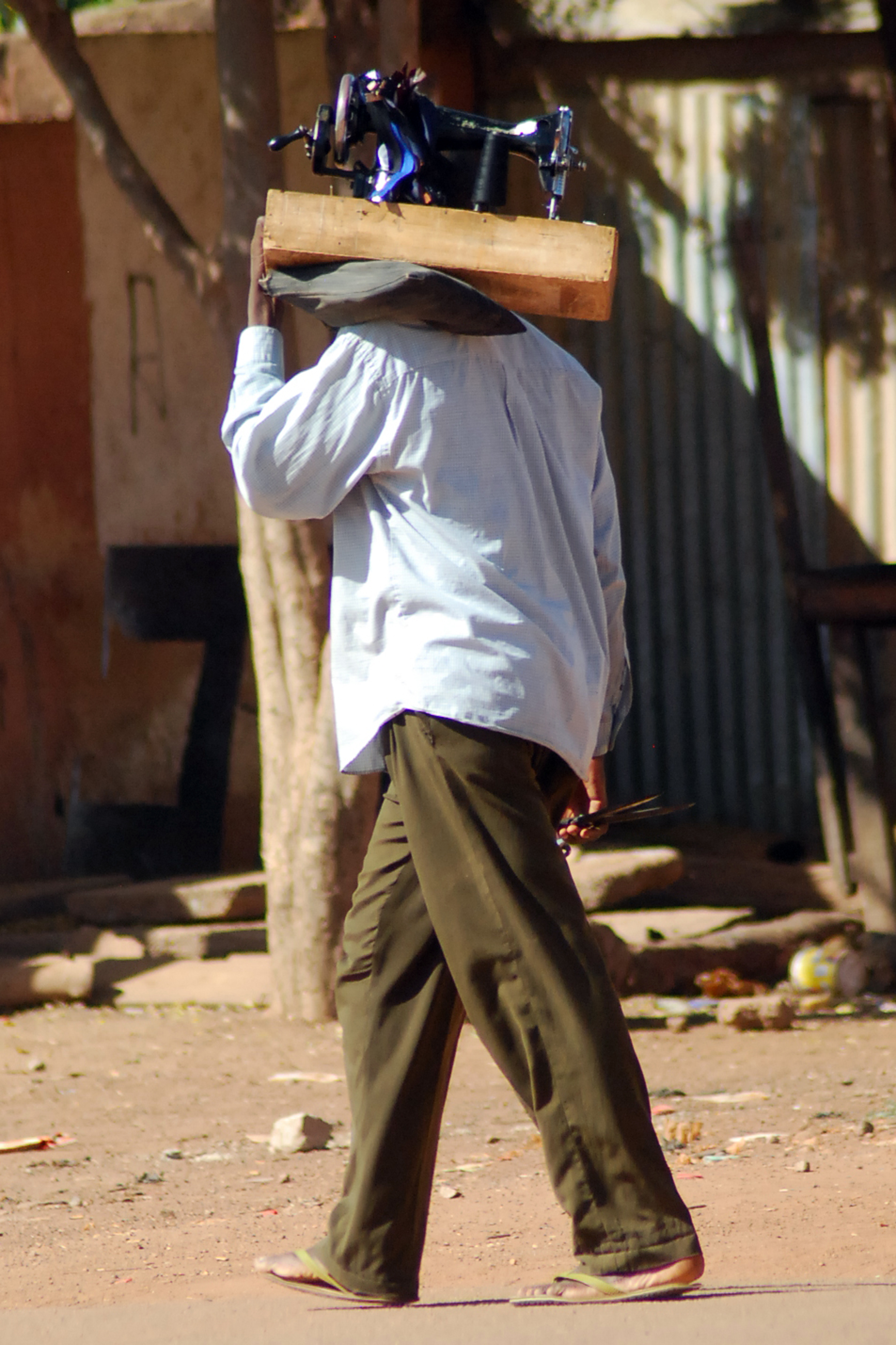 Un couturier ambulant portant sa machine à coudre dans les rues de Ouagadougou au Burkina Faso. This is an image with the theme "Africa on the Move or Transport" from: Burkina Faso